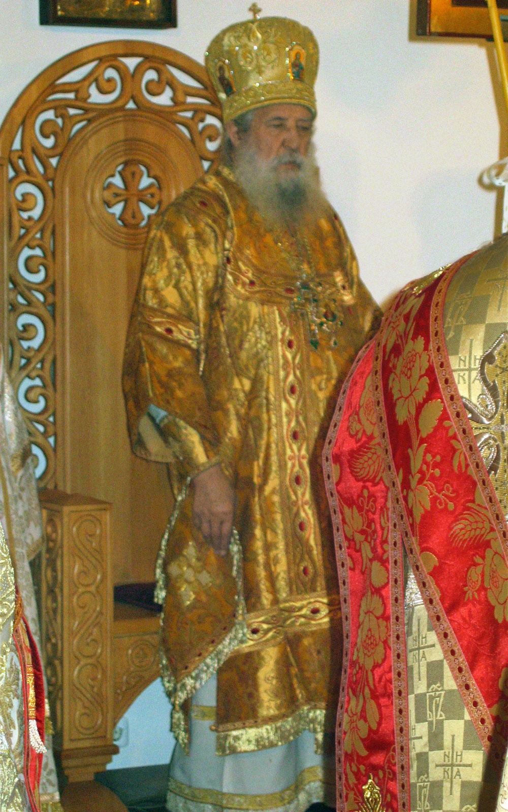 Metropolit Laurus beim Gottesdienst am 25-jährigen Jubiläum des bischöflichen Dienstes von S.E. Mark, Bischof von Berlin und Deutschland